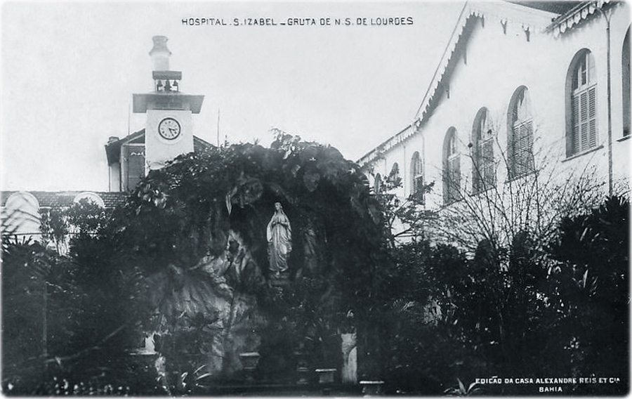 Gruta em homenagem a Nossa Senhora de Lourdes, situada diante da capela do Hospital Santa Izabel, em Salvador, Bahia, Brasil.